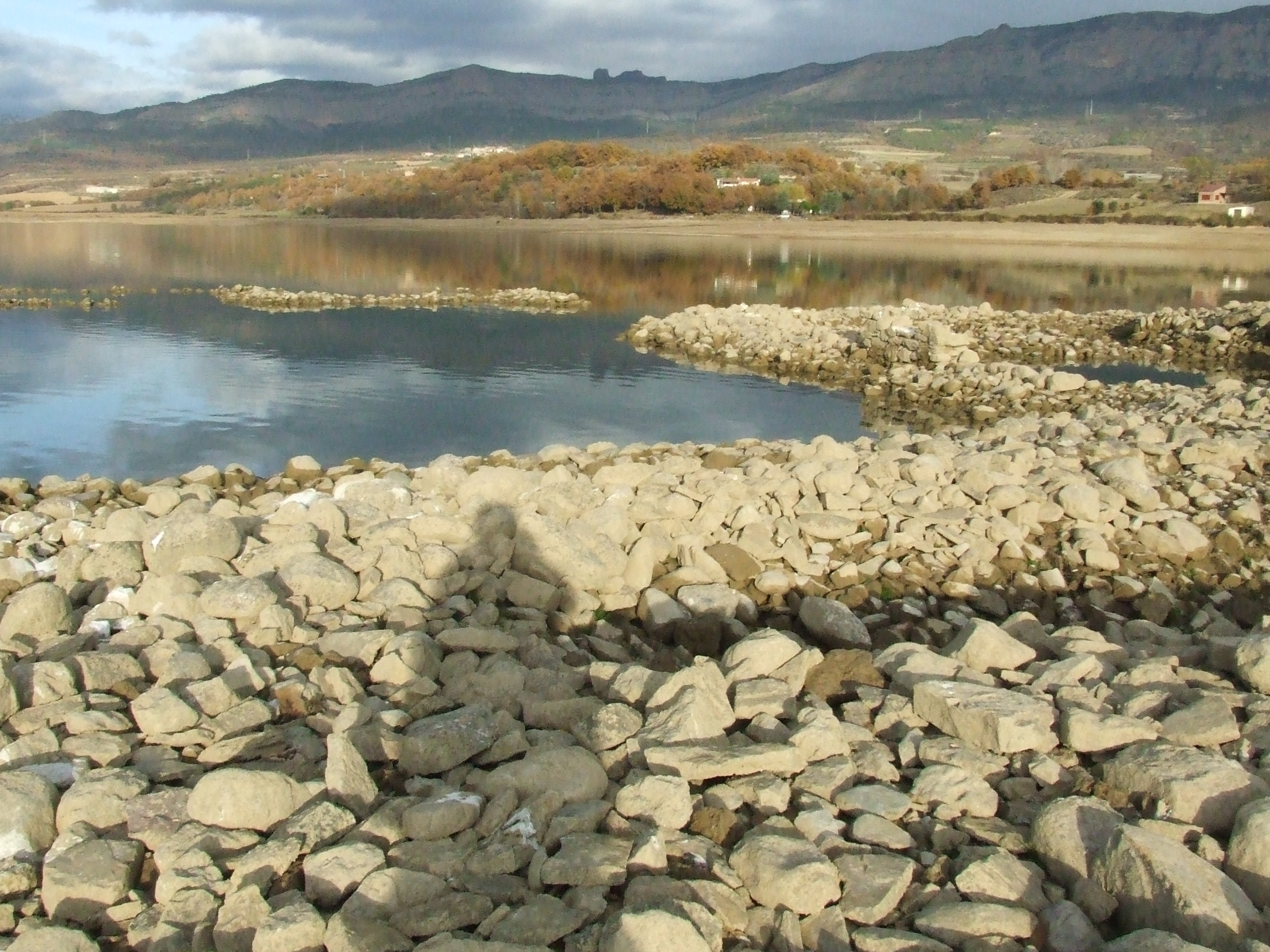 Sant Miquel (Aramunt, Conca de Dalt, Pallars Jussà)